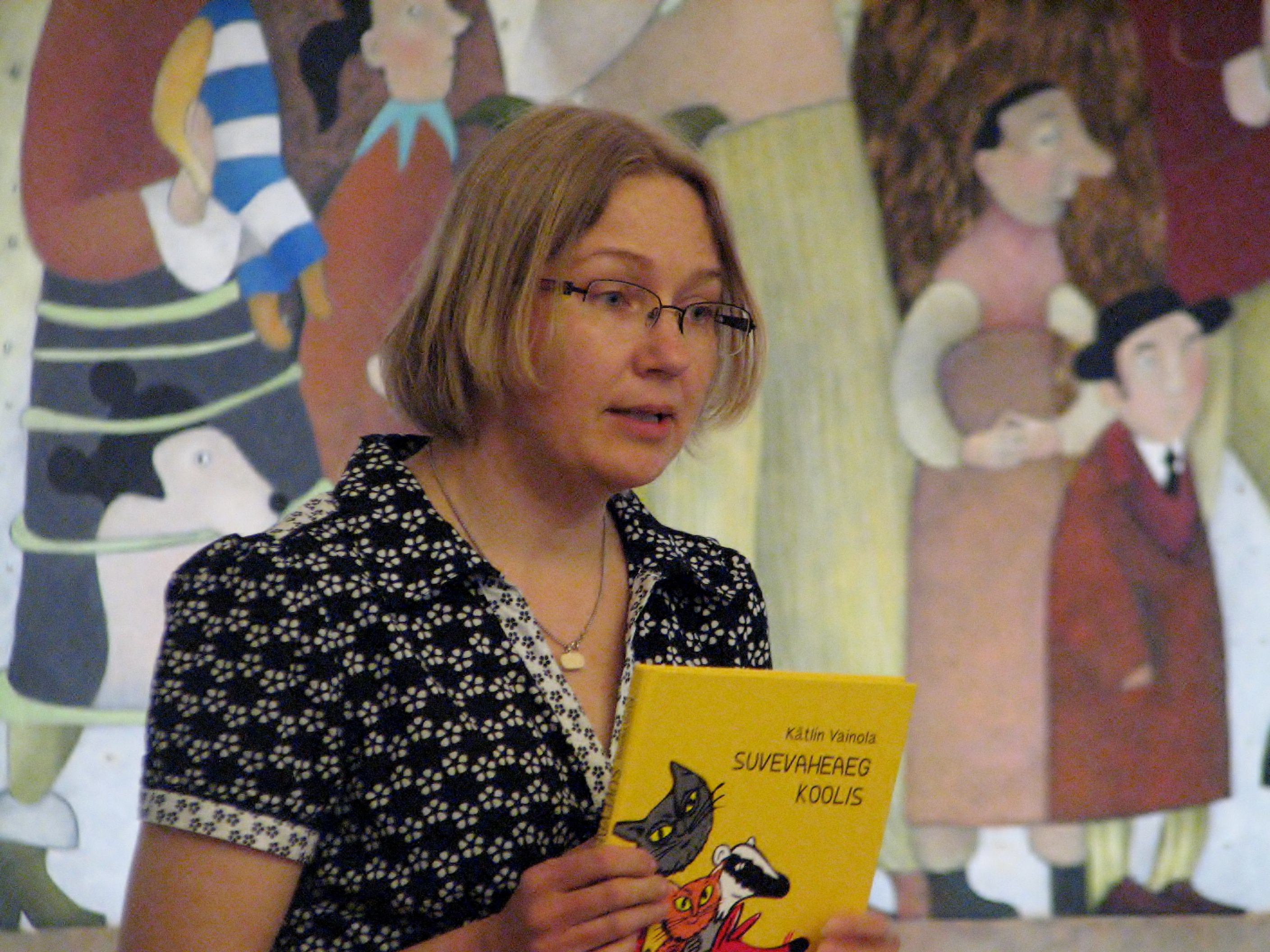 Kertu Sillaste kirjandusfestivali HeadRead raames Eesti Lastekirjanduse Keskuses tutvustamas oma illustreeritud raamatut "Suvevaheaeg koolis2